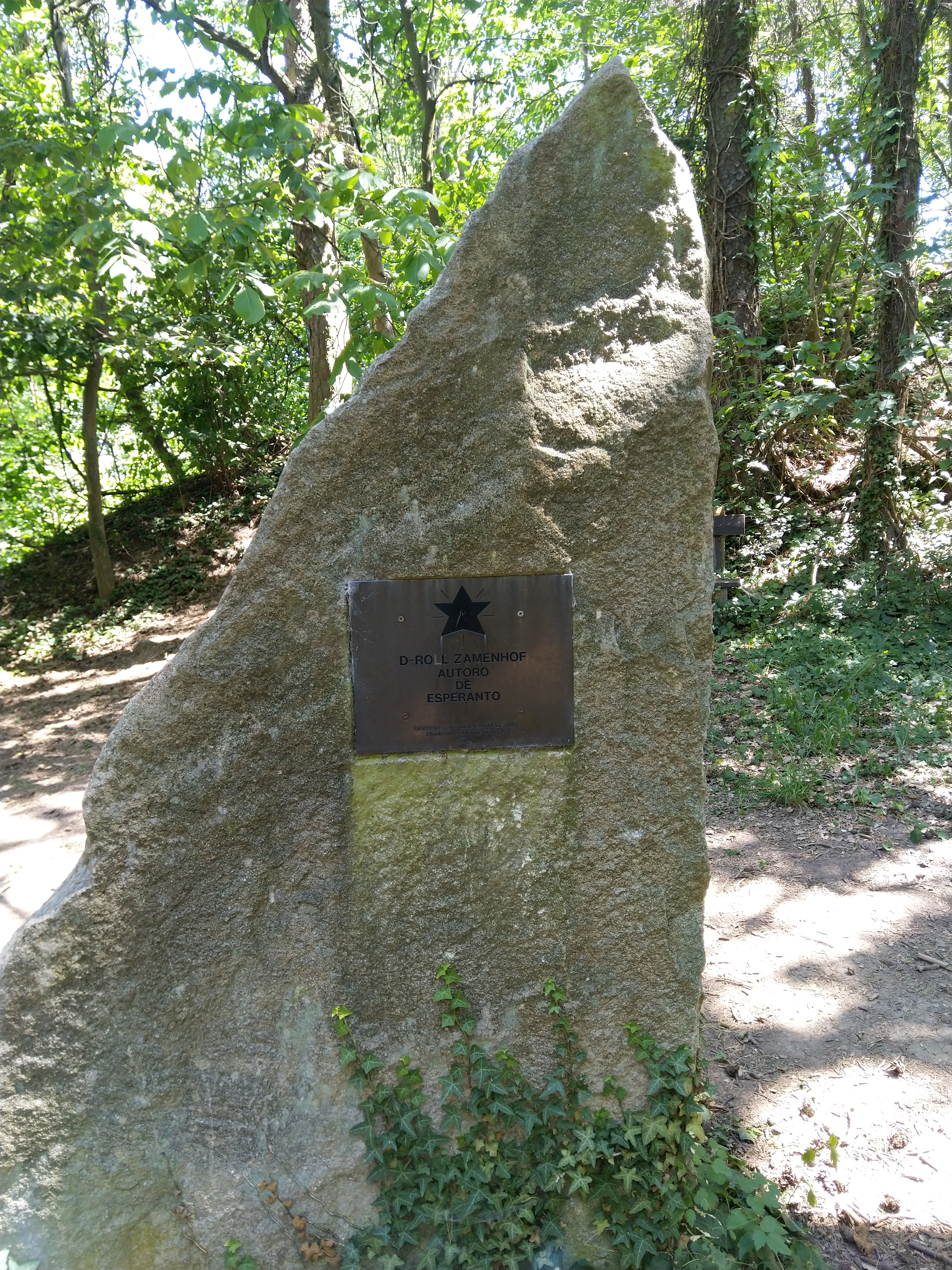 Sur la Sedan-placo de la vilagxo Flonheim trovigxas tiu monumento